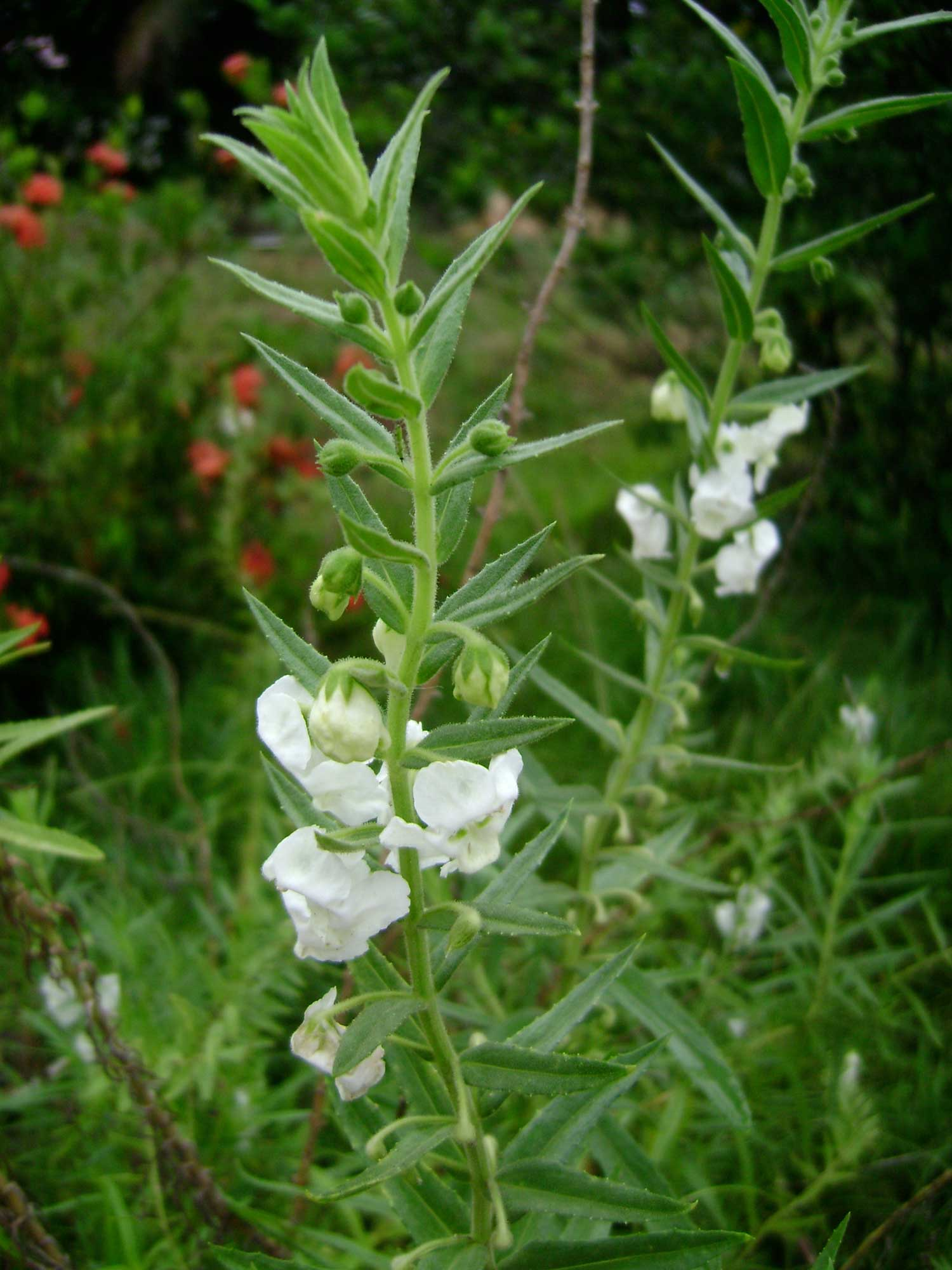 Angelonia salicariifolia